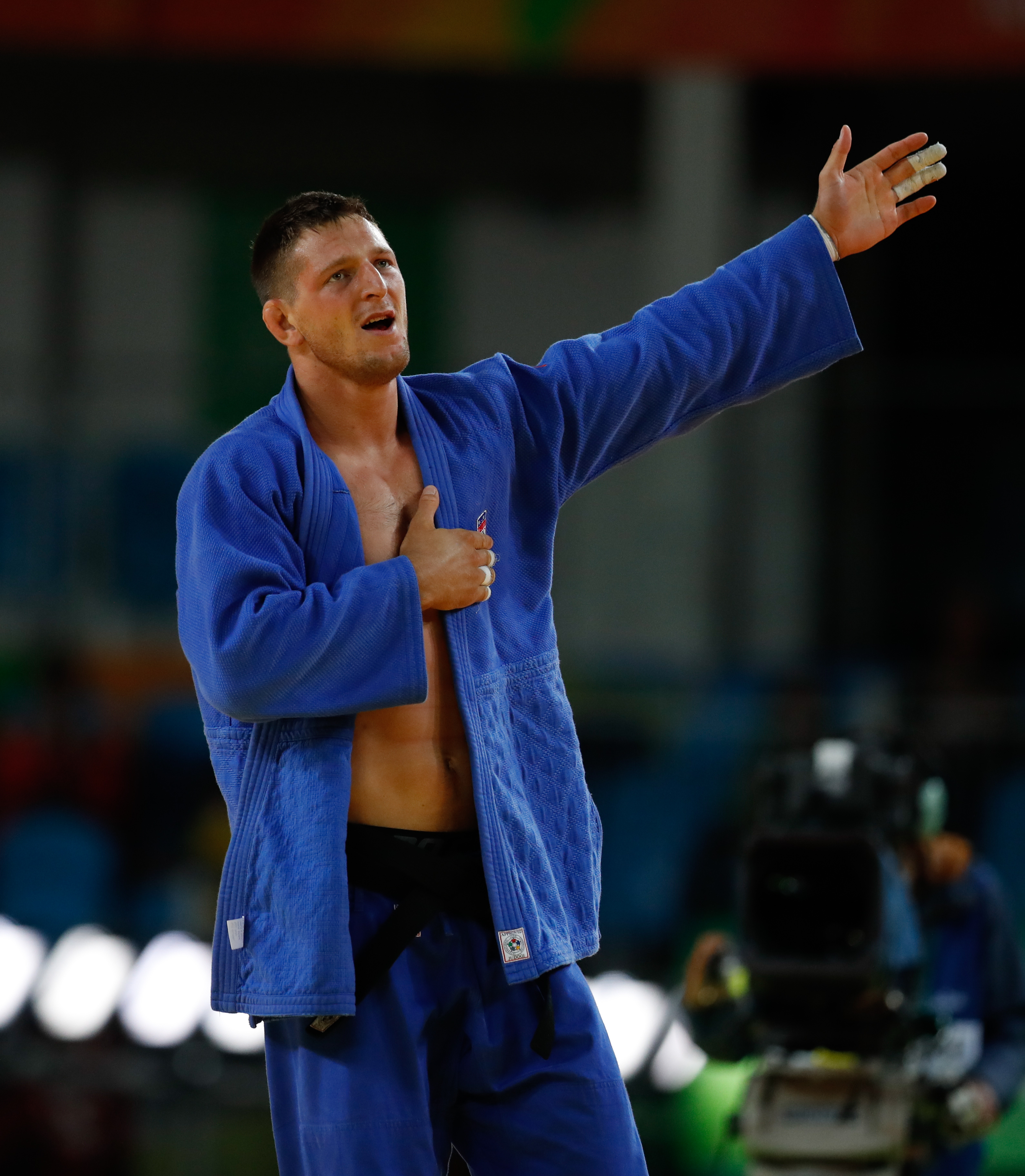 Rio de Janeiro - O judoca tcheco Lukas Krpalek vence o azerbaijano Elmar Gasimov na categoria até 100 quilos e ganha medalha de ouro na Rio 2016